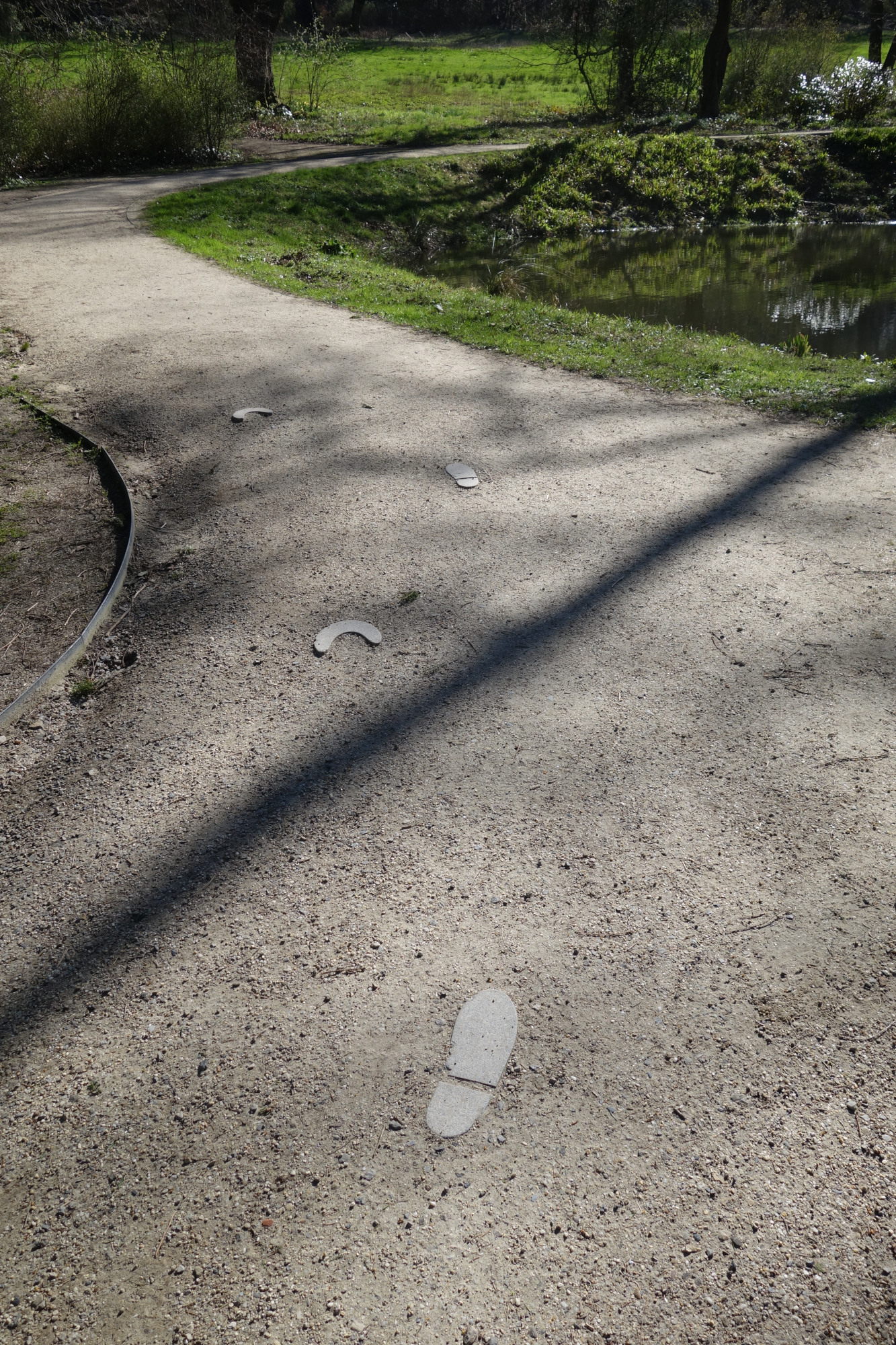 Müschpark - Fuß- und Hufabdruck des Teufels